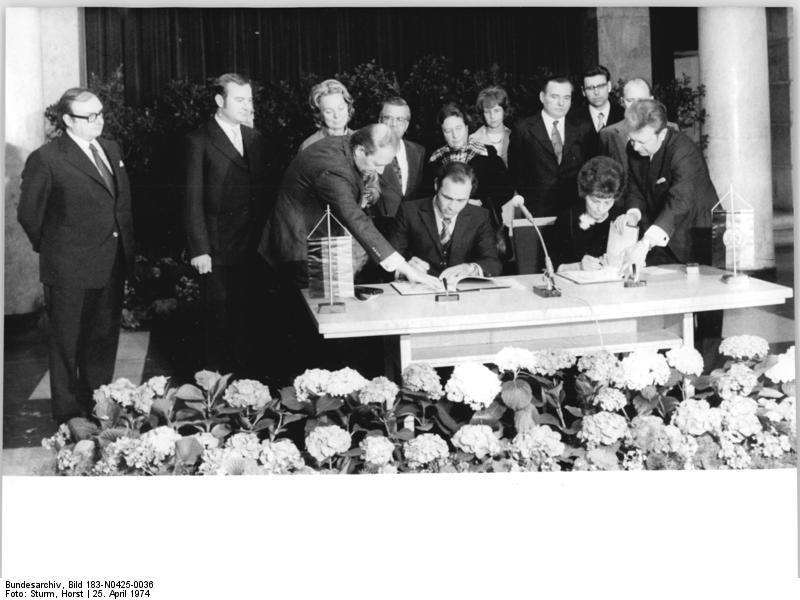 ADN-ZB Sturm-25-4-74 Berlin: Regierungsabkommen zwischen der DDR und der BRD auf dem Gebiet des Gesundheitswesens unterzeichnet- Das Abkommen zwischen der Regierung der DDR und der Regierung der BRD auf dem Gebiet des Gesundheitswesens wurde am 25.4.74 im Haus der Ministerien vom Stellvertreter des Ministers für Gesundheitswesen der DDR, Frau OMR Anneliese Toedtmann (r.) und vom Staatssekretär im Bundesministerium für Jugend, Familie und Gesundheit der BRD, Prof. Dr. Hans-Georg Wolters (l.) unterzeichnet.